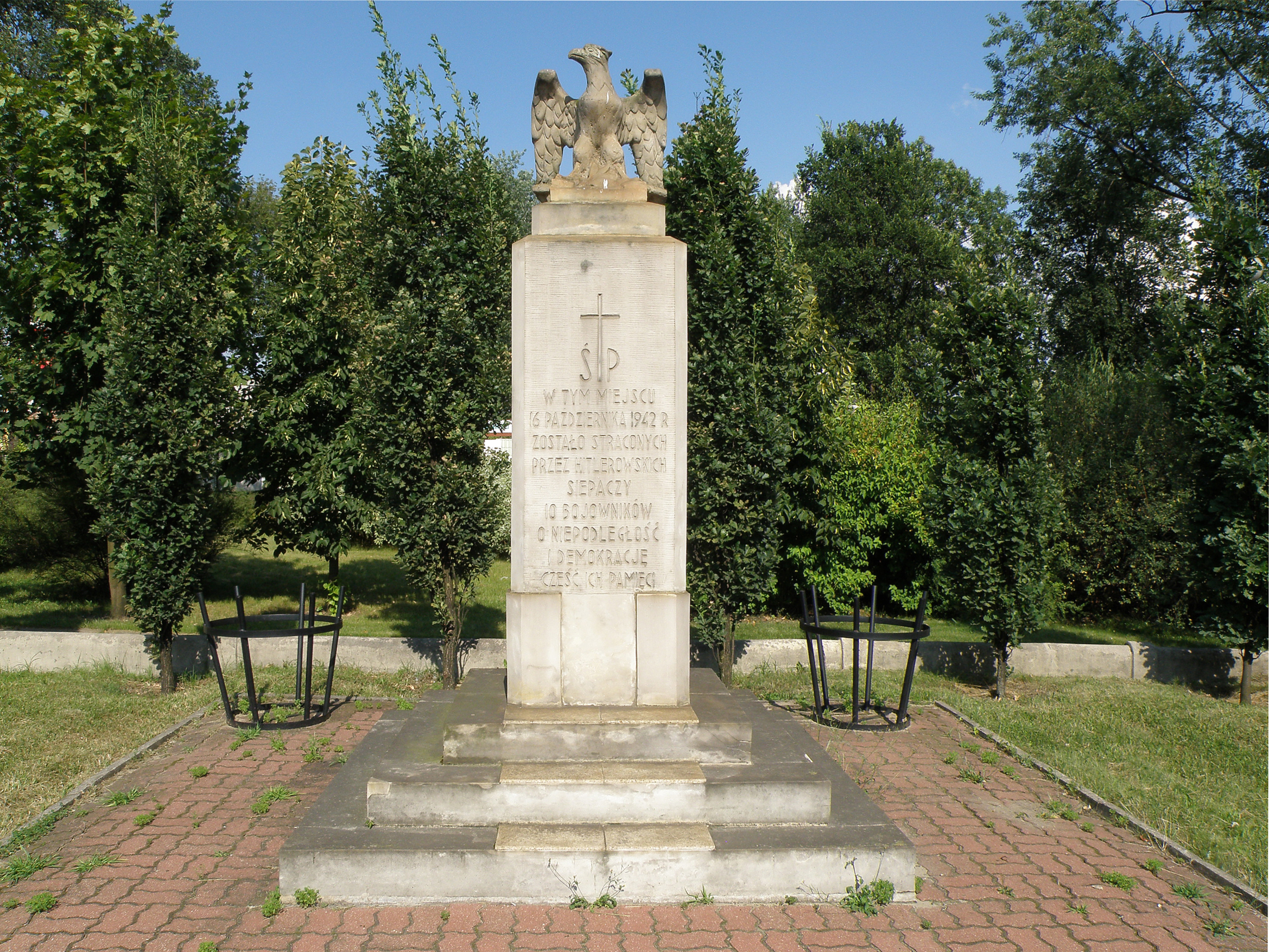 Warszawa, Rembertów - pomnik przy ul. Cyrulików upamiętniający powieszonych więźniów Pawiaka - "W tym miejscu 16 października 1942 r. zostało straconych przez hitlerowskich siepaczy 10 bojowników o niepodległość i demokrację"